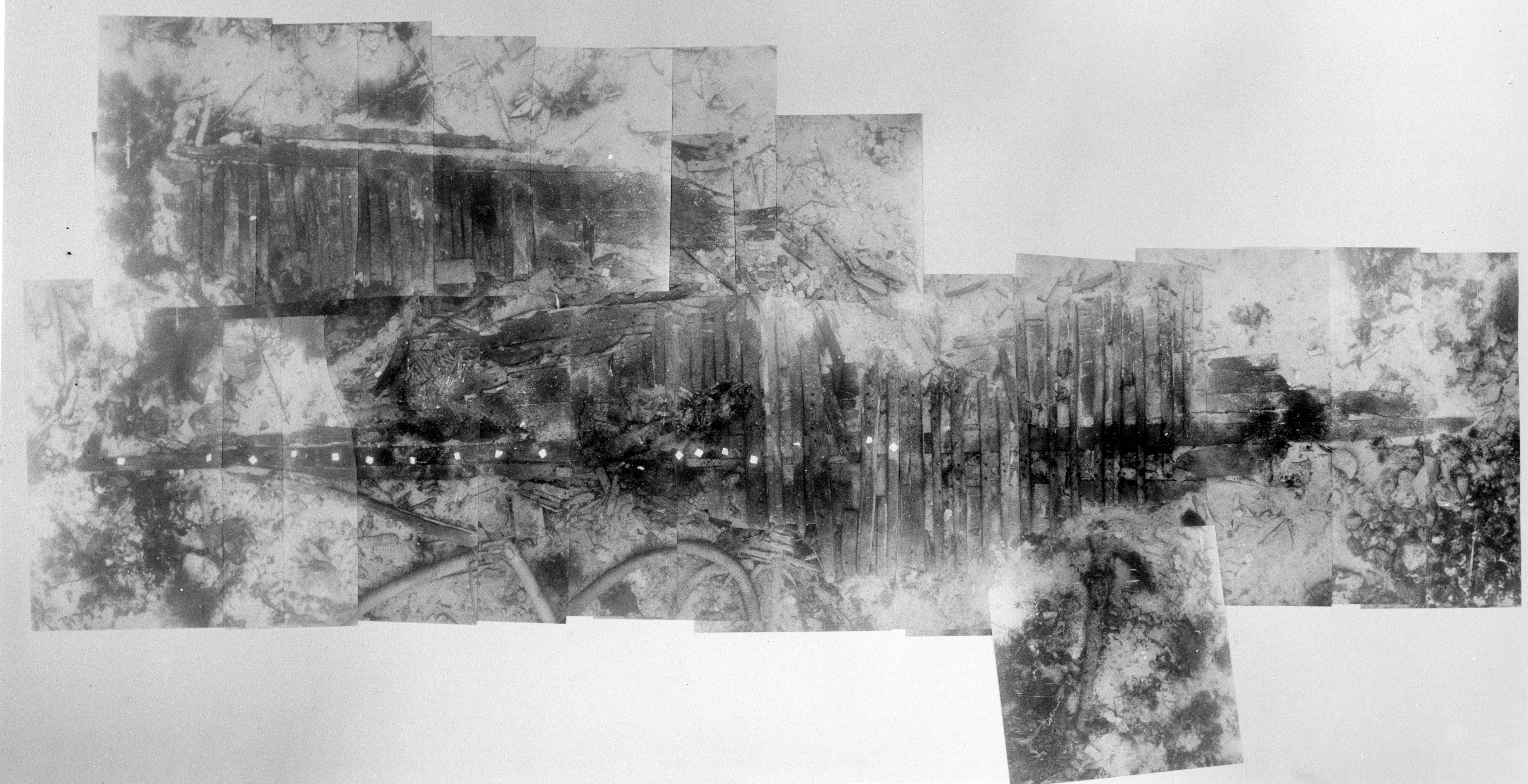 Montasje - foto av vrakrestene. Tatt under undersøkelsene på åttitallet. Ved bruk, krediter: Foto: Nils Aukan / NTNU Vitenskapsmuseet If used, please credit: Photo: Nils Aukan / NTNU Museum